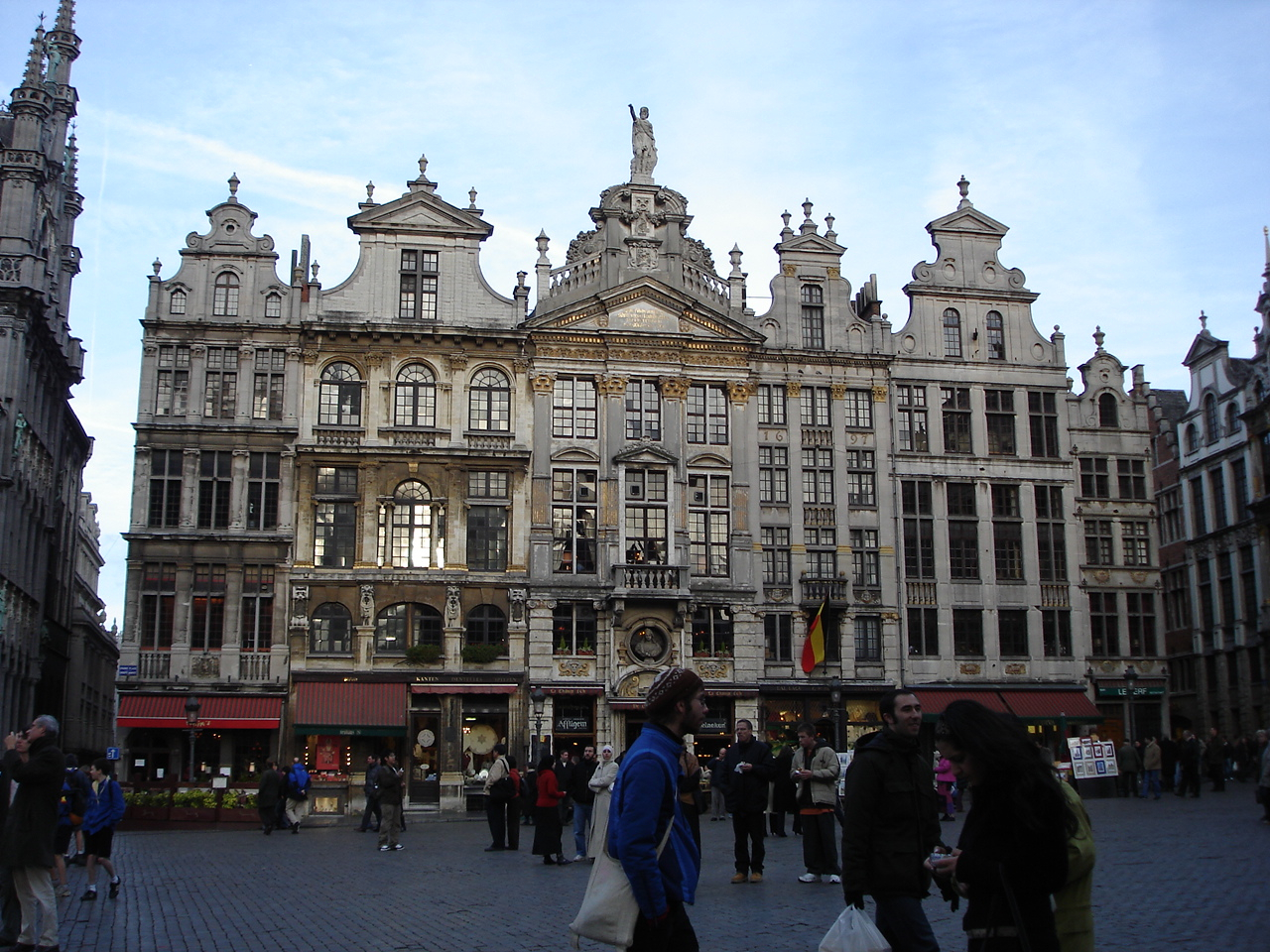 Bruxelles_Grand_Place01.jpg